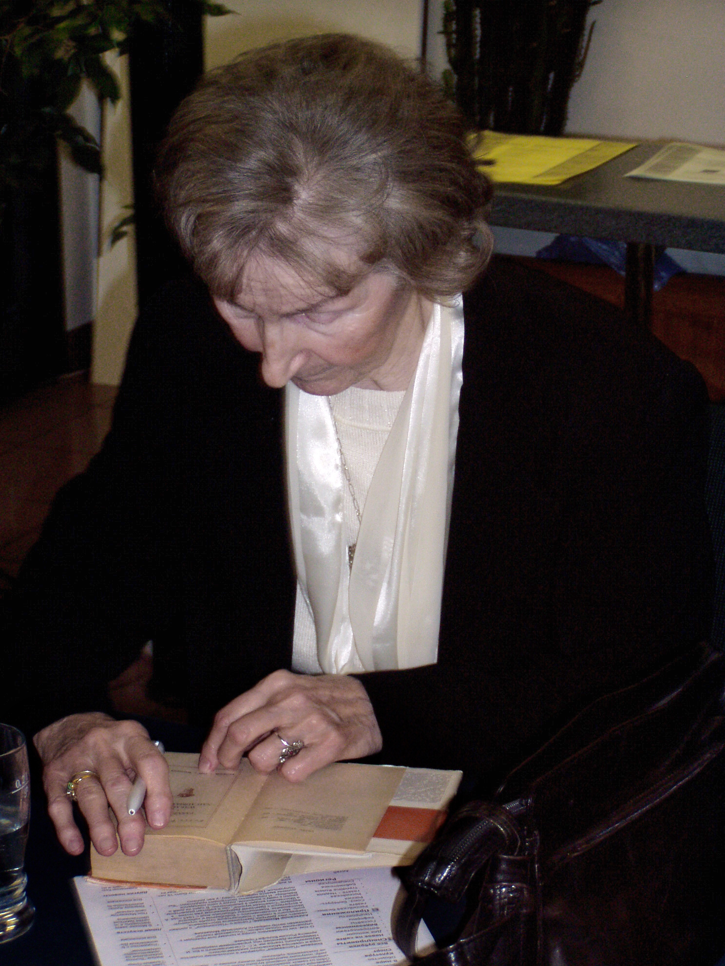 Zofia Posmysz na setkání s veřejností v Krakově